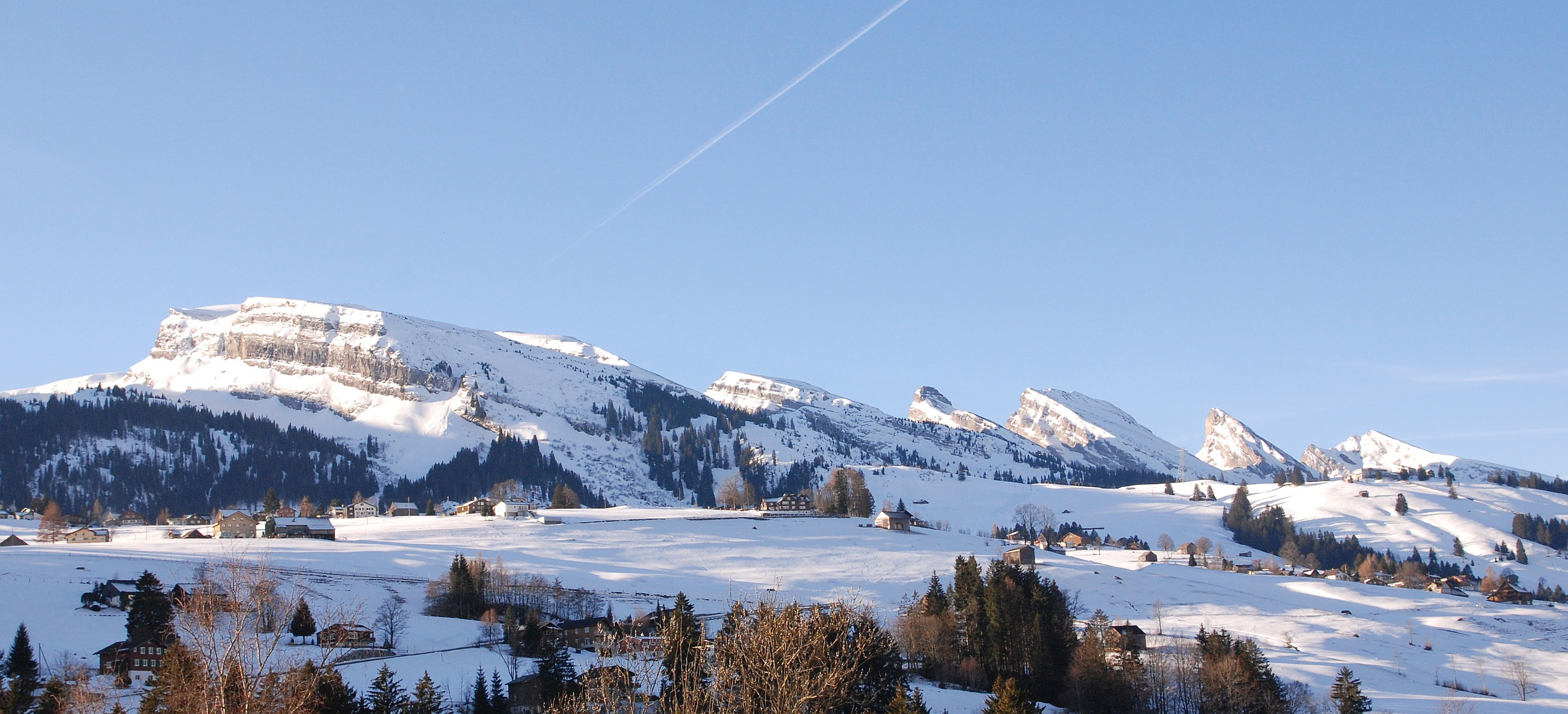 Churfirsten von Wildhaus (SG) aus